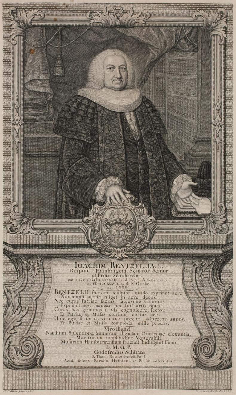 Joachim Rentzel (1694–1768), Kupferstich von Johann Christian Gottfried Fritzsch nach einem Porträt von Theodor Friedrich Stein.